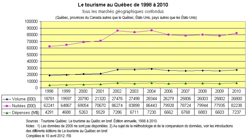 Compilation des statistiques touristiques du Québec fournies par Tourisme Québec dans sa publication annuelle : Le tourisme au Québec en bref.